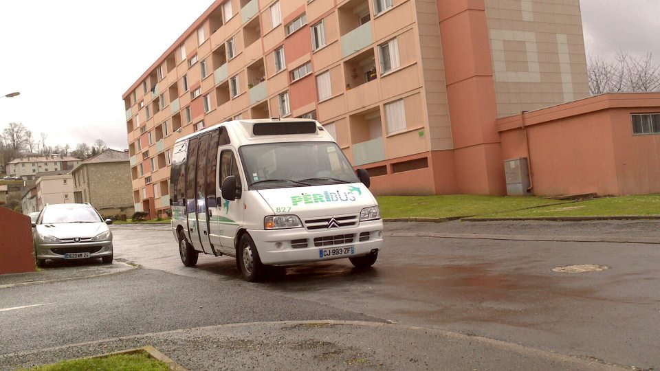 Péribus